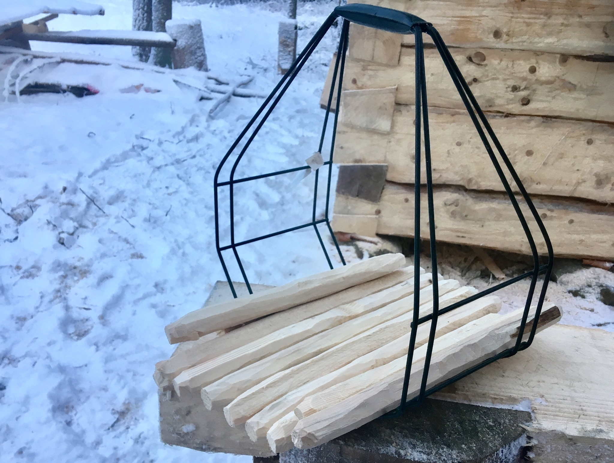 Salapulgad